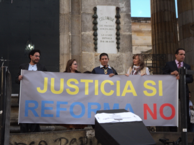 Congresistas rechazando la Reforma a la Justicia en Colombia de 2012 frente al Capitolio Nacional